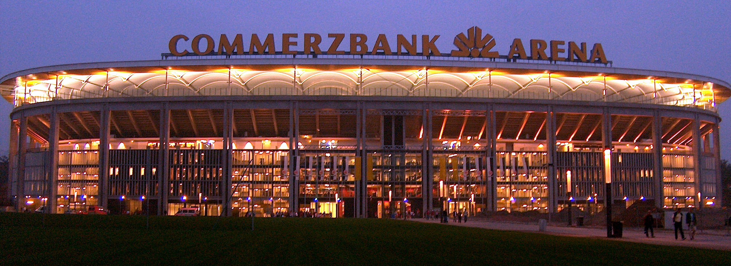 en.: Commerzbank-Arena at Frankfurt, Germany 2006. dt.: Commerzbank-Arena in Frankfurt am Main, aufgenommen nach dem BL-Spiel Eintracht Frankfurt gegen Bayer 04 leverkusen am 17. September 2006, von Süden aus gesehen.